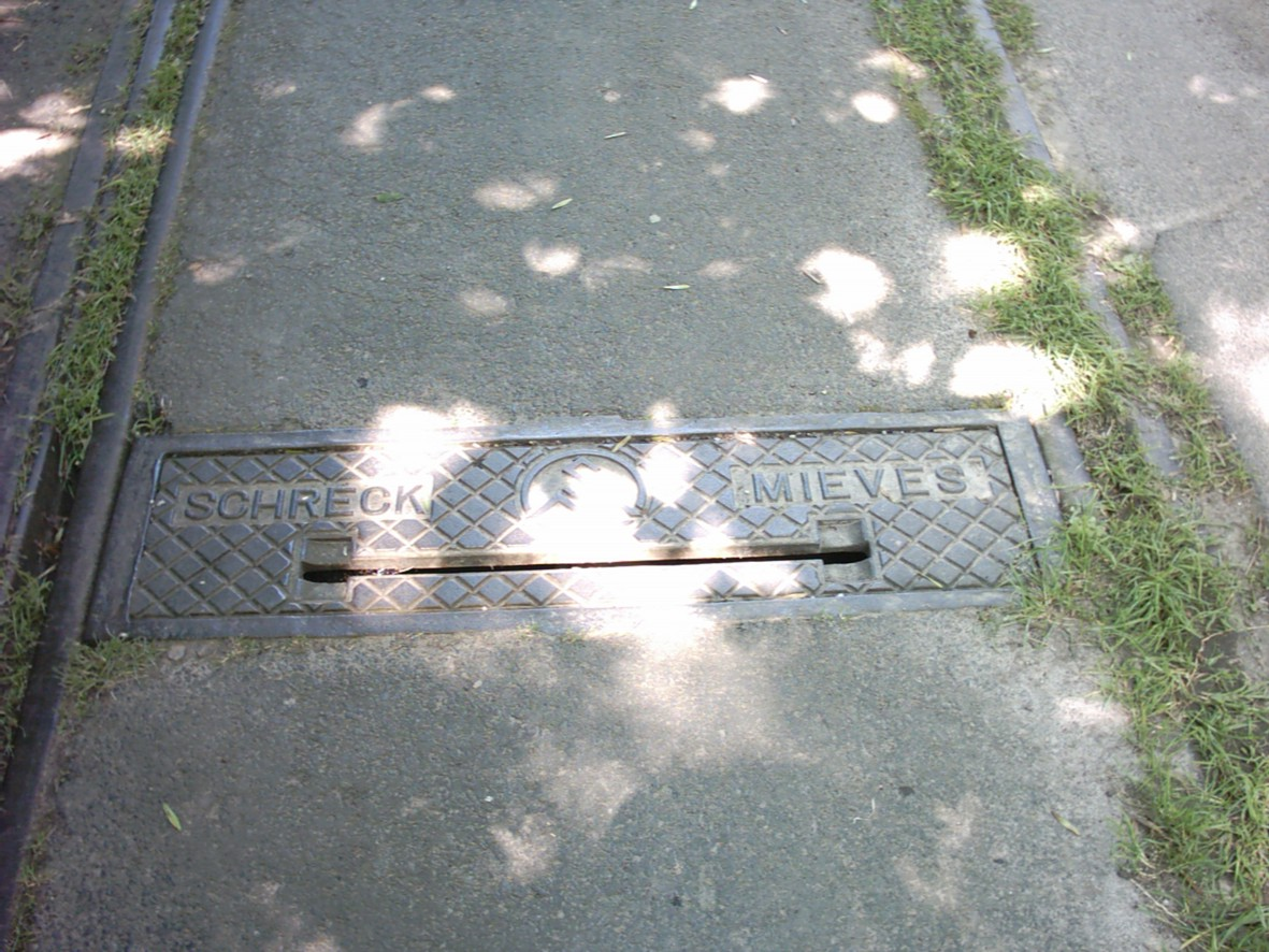 Reste der Hafenbahn Hann. Münden, Weiche